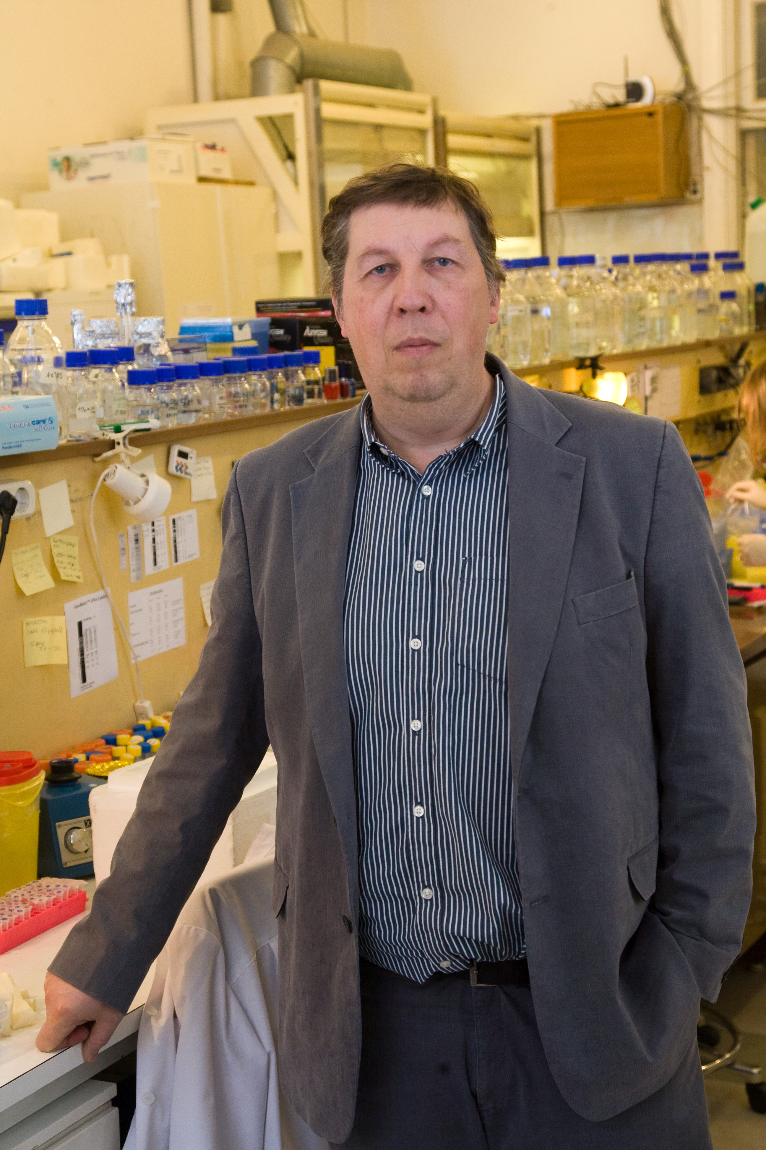 Tartu Ülikooli Molekulaar- ja Rakubioloogia Instituudi üldise ja mikroobibiokeemia õppetool. Õppetooli juhataja, biomeditsiini ja biotehnoloogia doktorikooli juhataja Juhan Sedman.